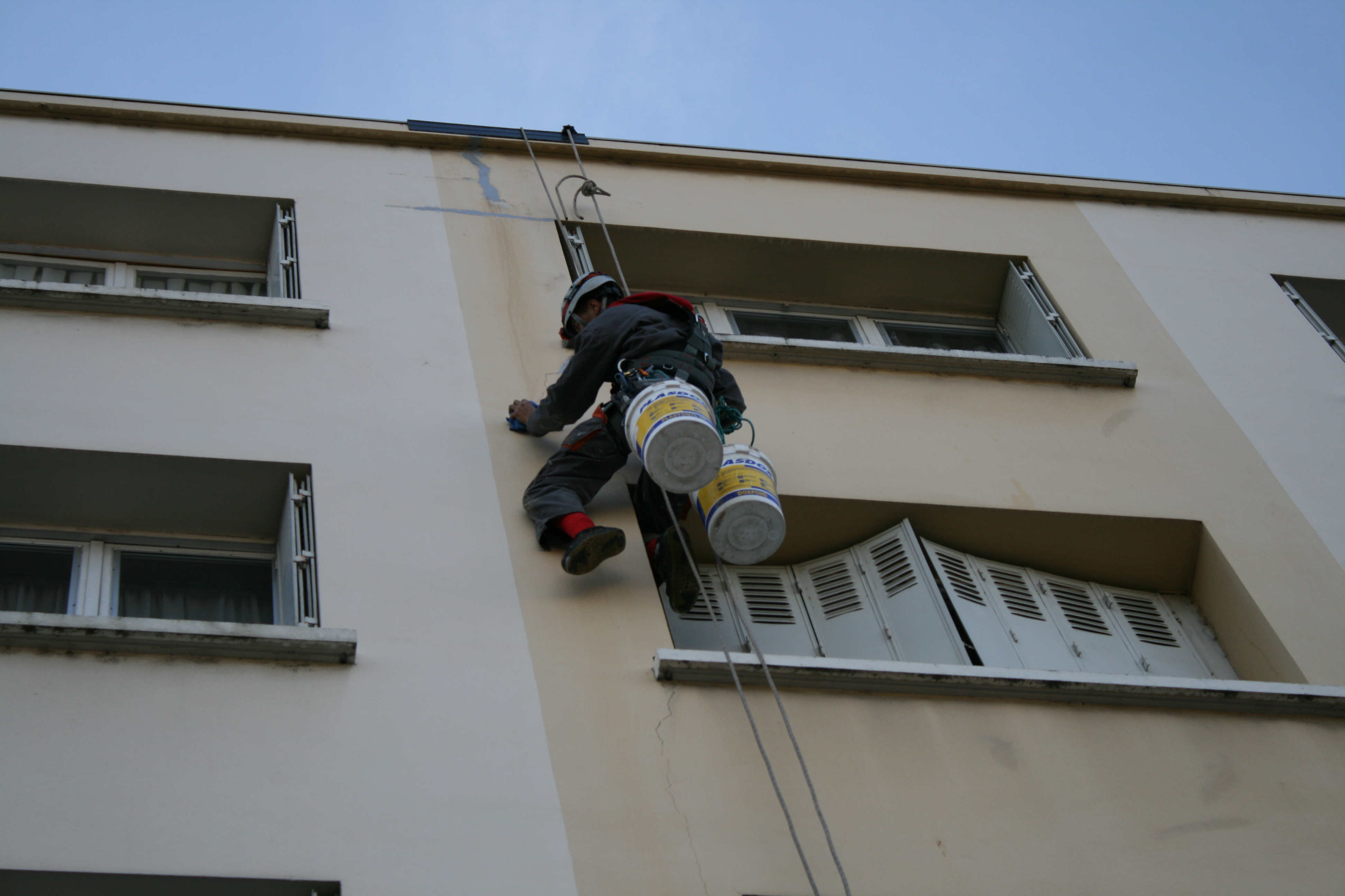 Technicien cordiste sur façade réalisant des joints d'étanchéité